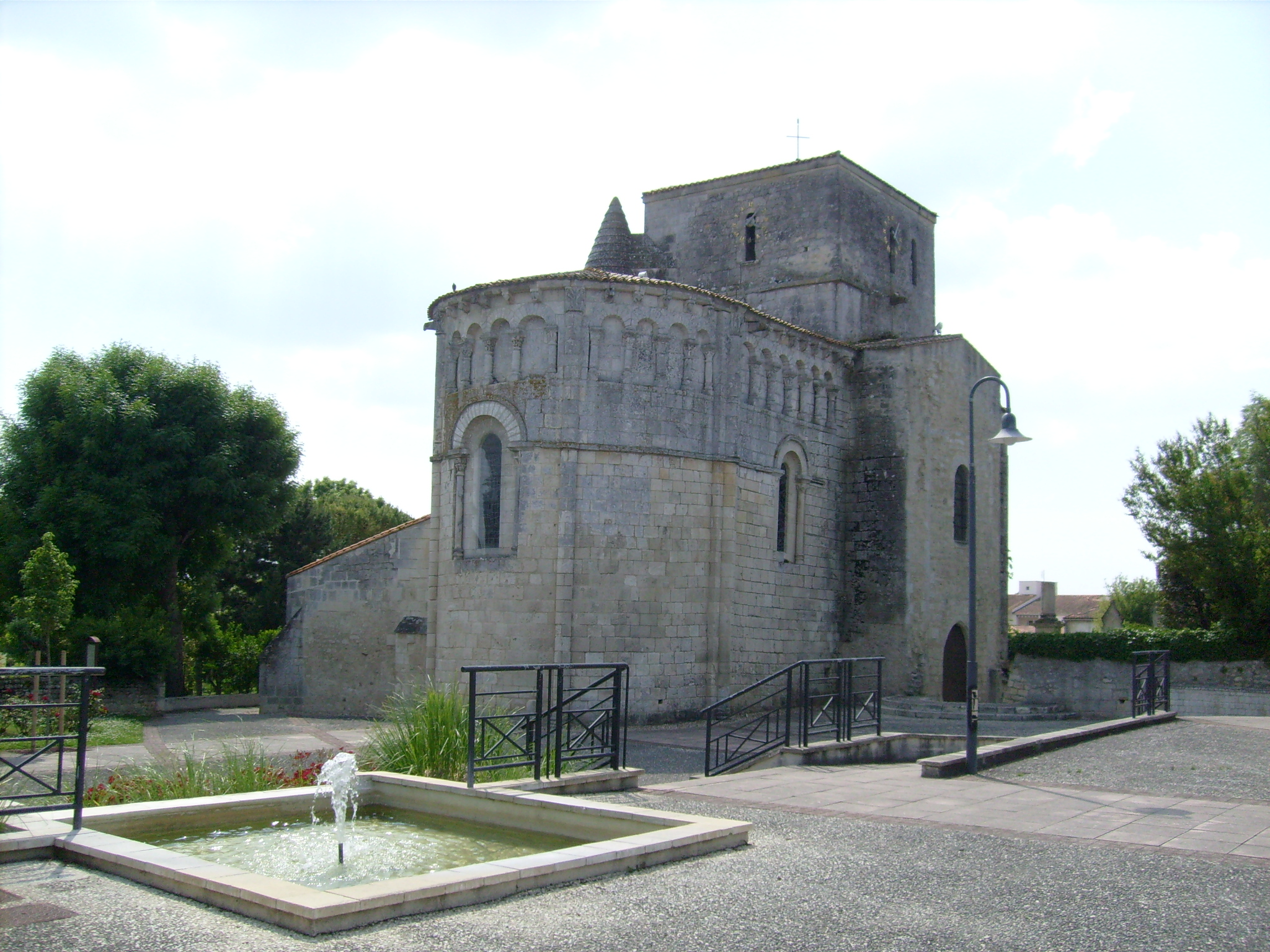 L'église de Vaux-sur-Mer, Charente-Maritime